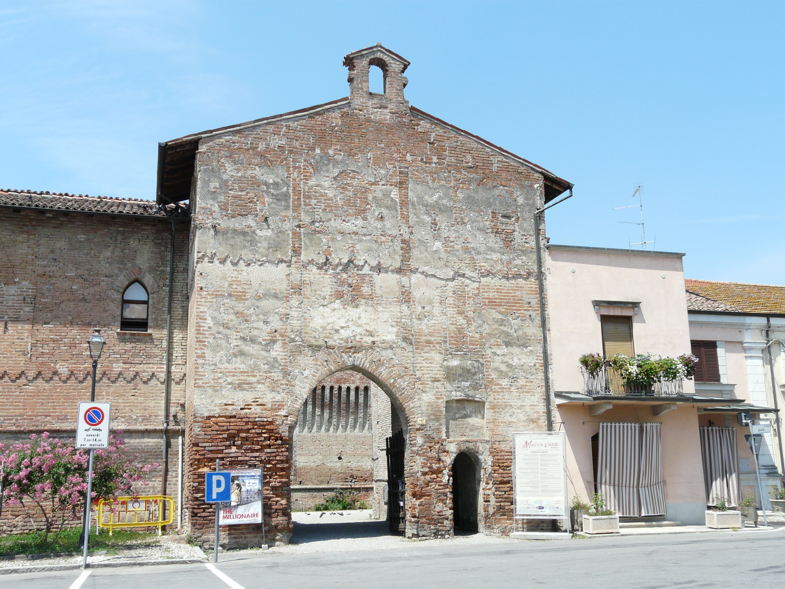 Castello di Roccabianca, Emilia-Romagna, Italia